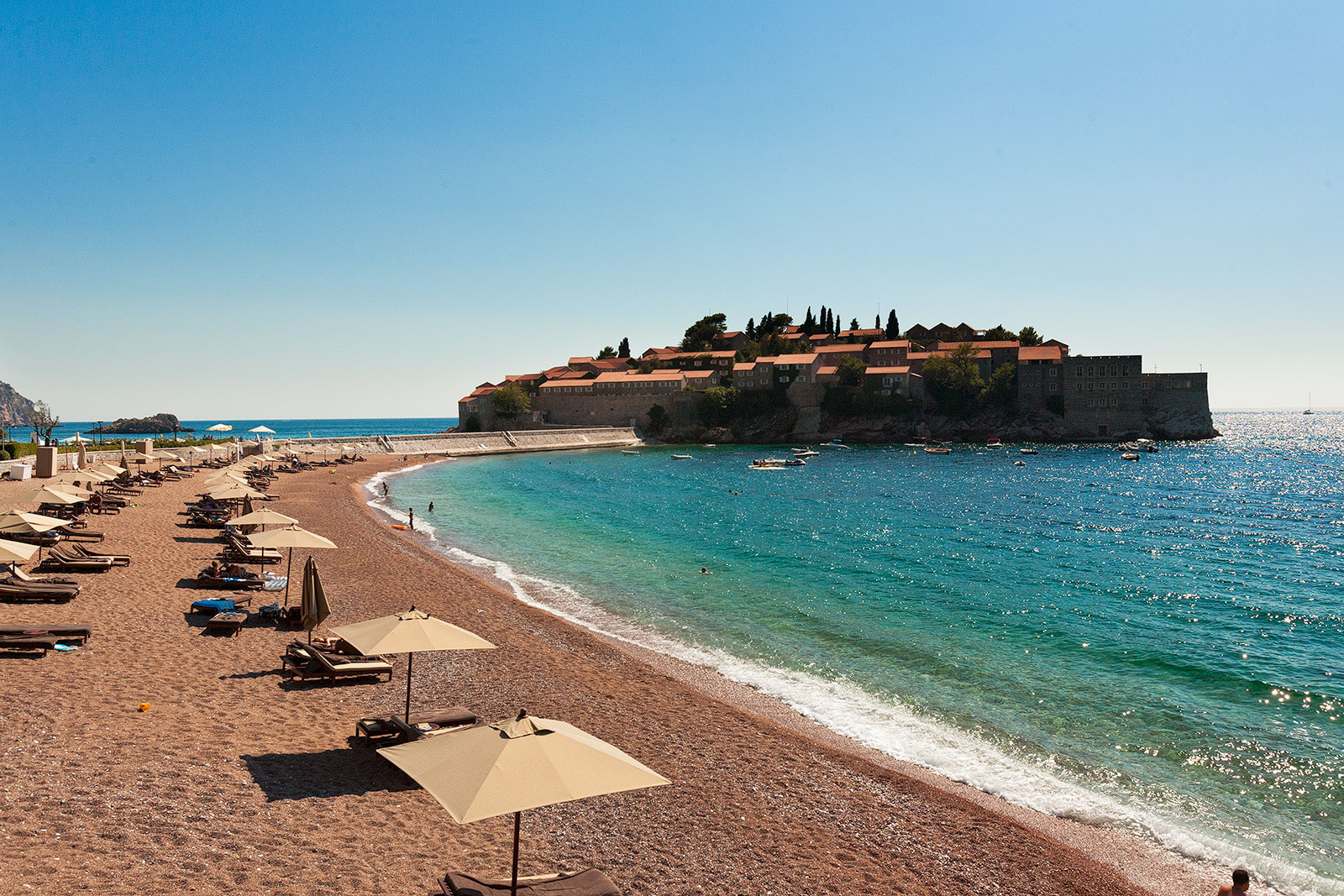 Готель-місто Светі Стефан в Чорногрії - своєрідна візитна картка країни.